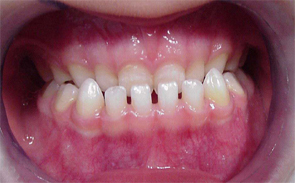 Bild einer vererbten Progenie. Hier die Tochter mit 4 Jahren.